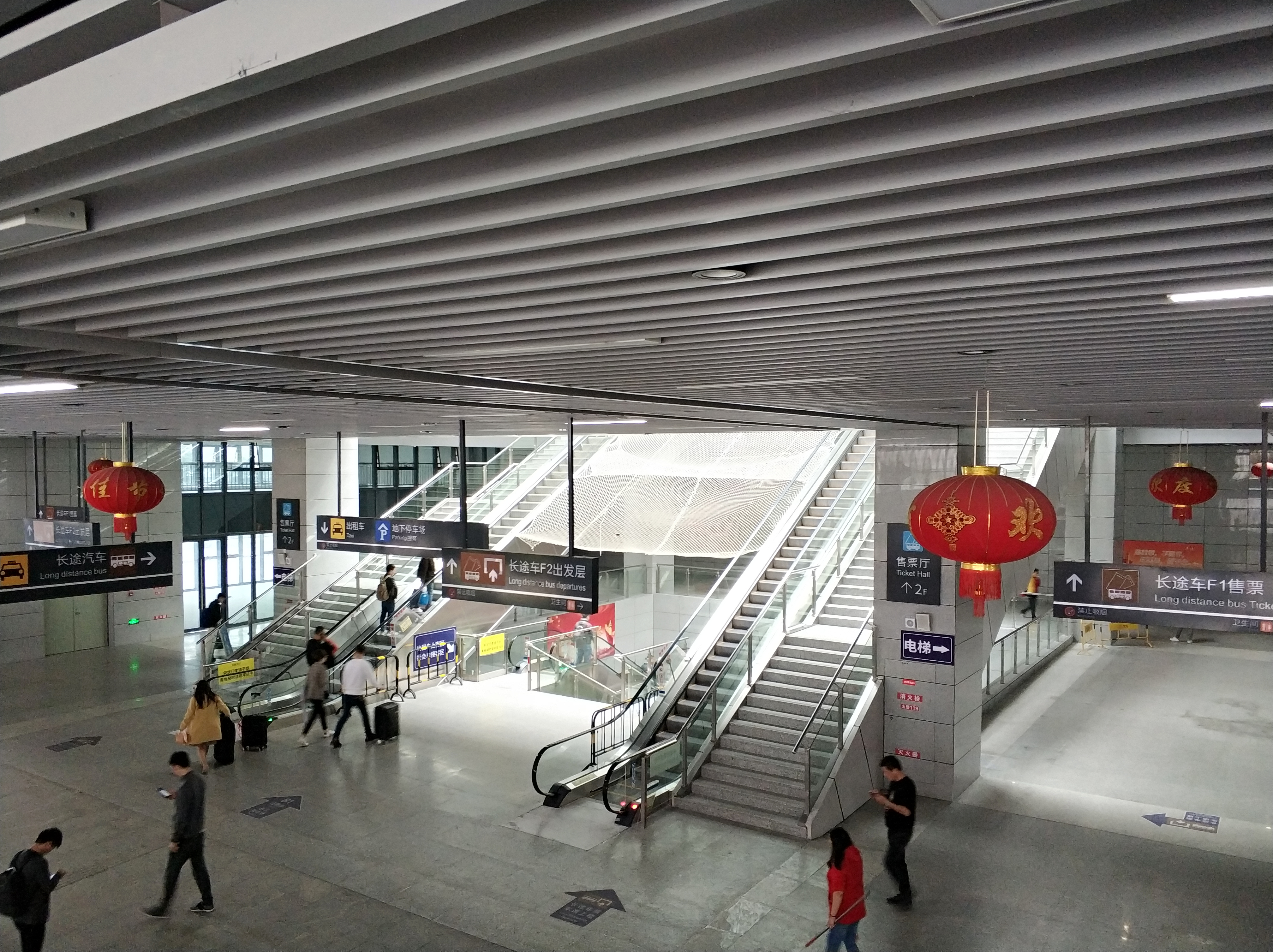 中文（中国大陆）: 泉州火车站